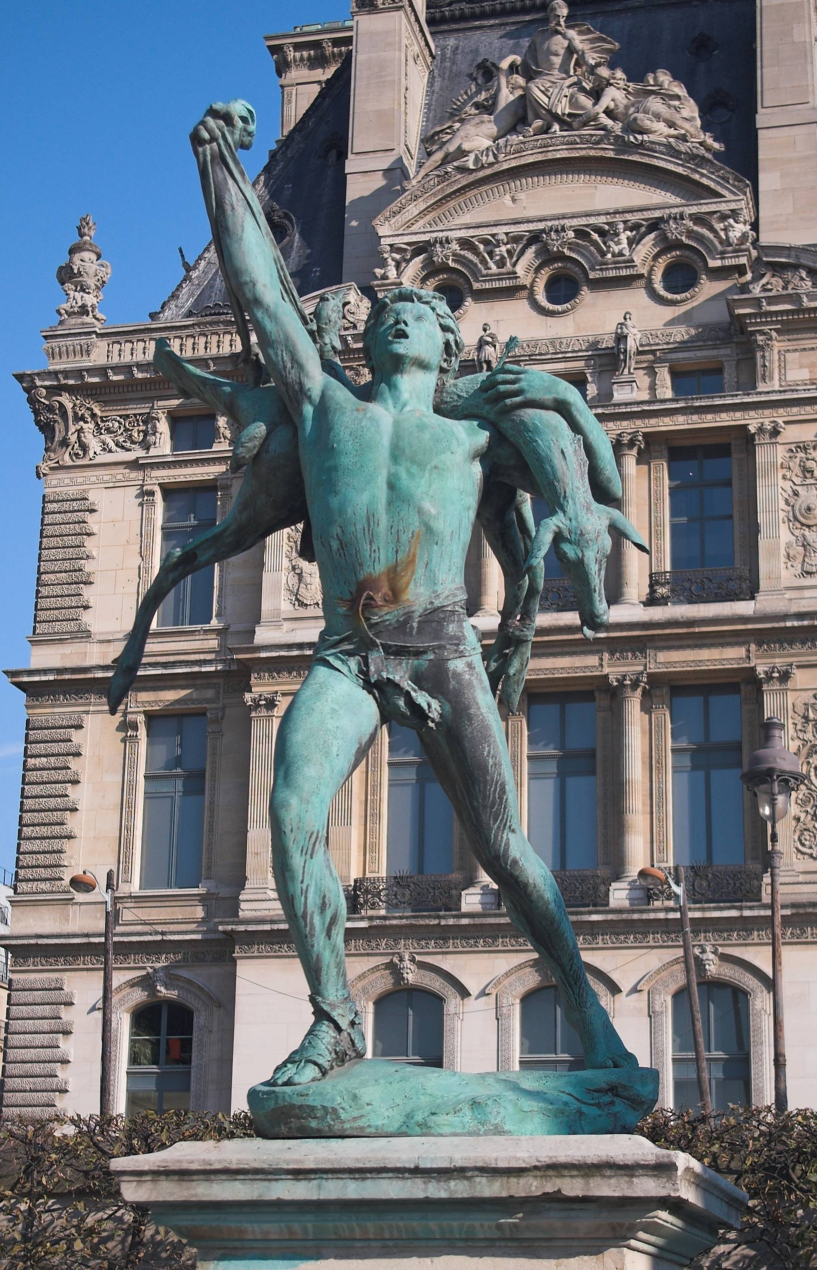 Le Retour de Chasse, Antonin Carlès. Sculpture installée dans le jardin des Tuileries.